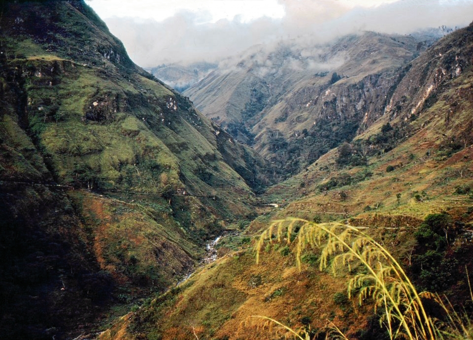 Montes de Atsabe